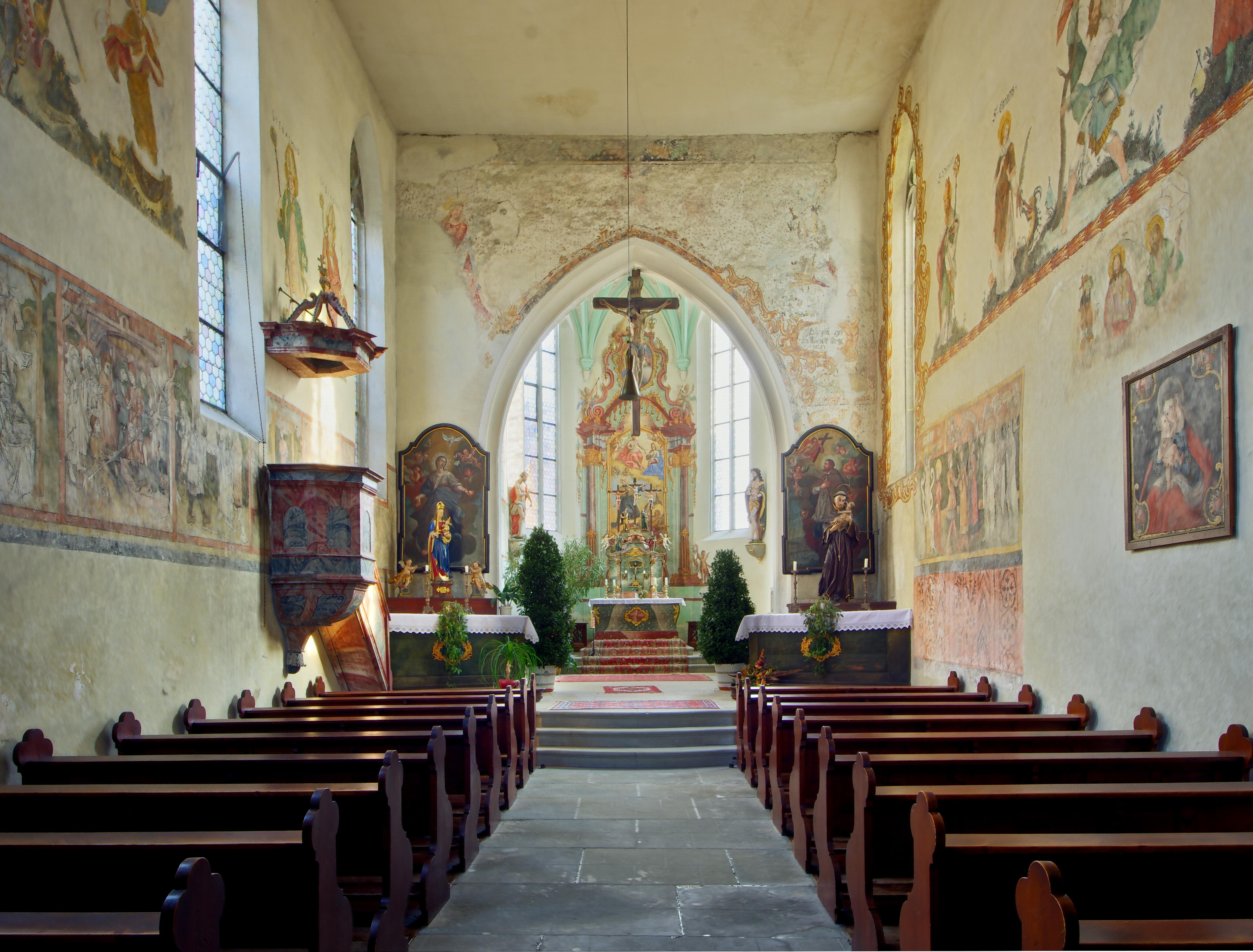 St. Jodok Überlingen Blick zum Altar